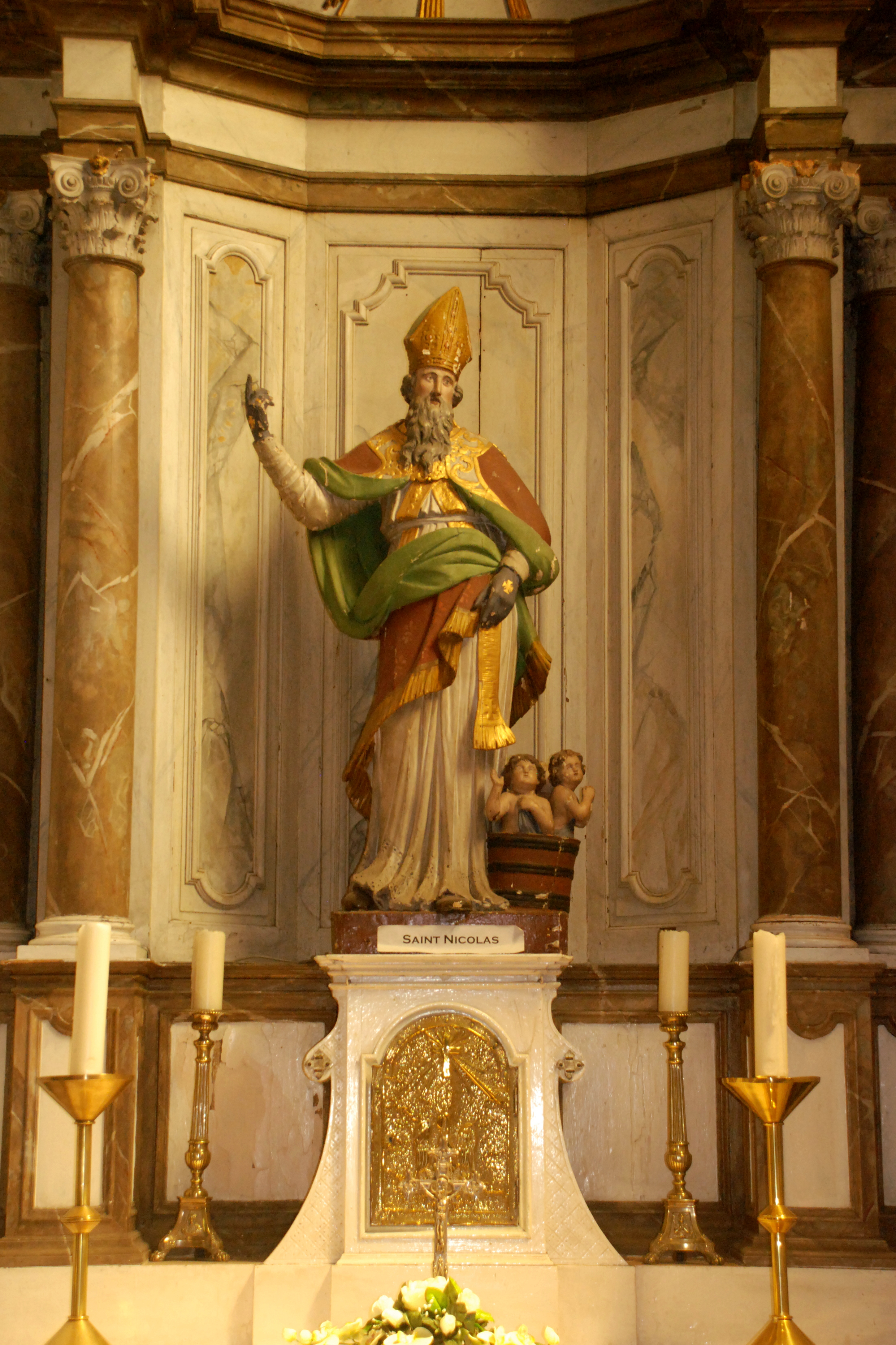 Belgique - Bousval - Église Saint-Barthélemy de Bousval